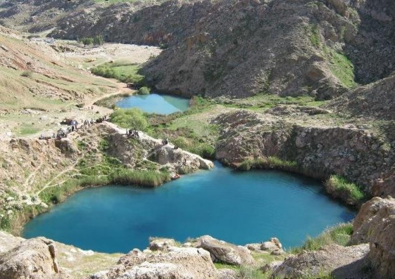 دریاچه دو قلو سیاه گاو